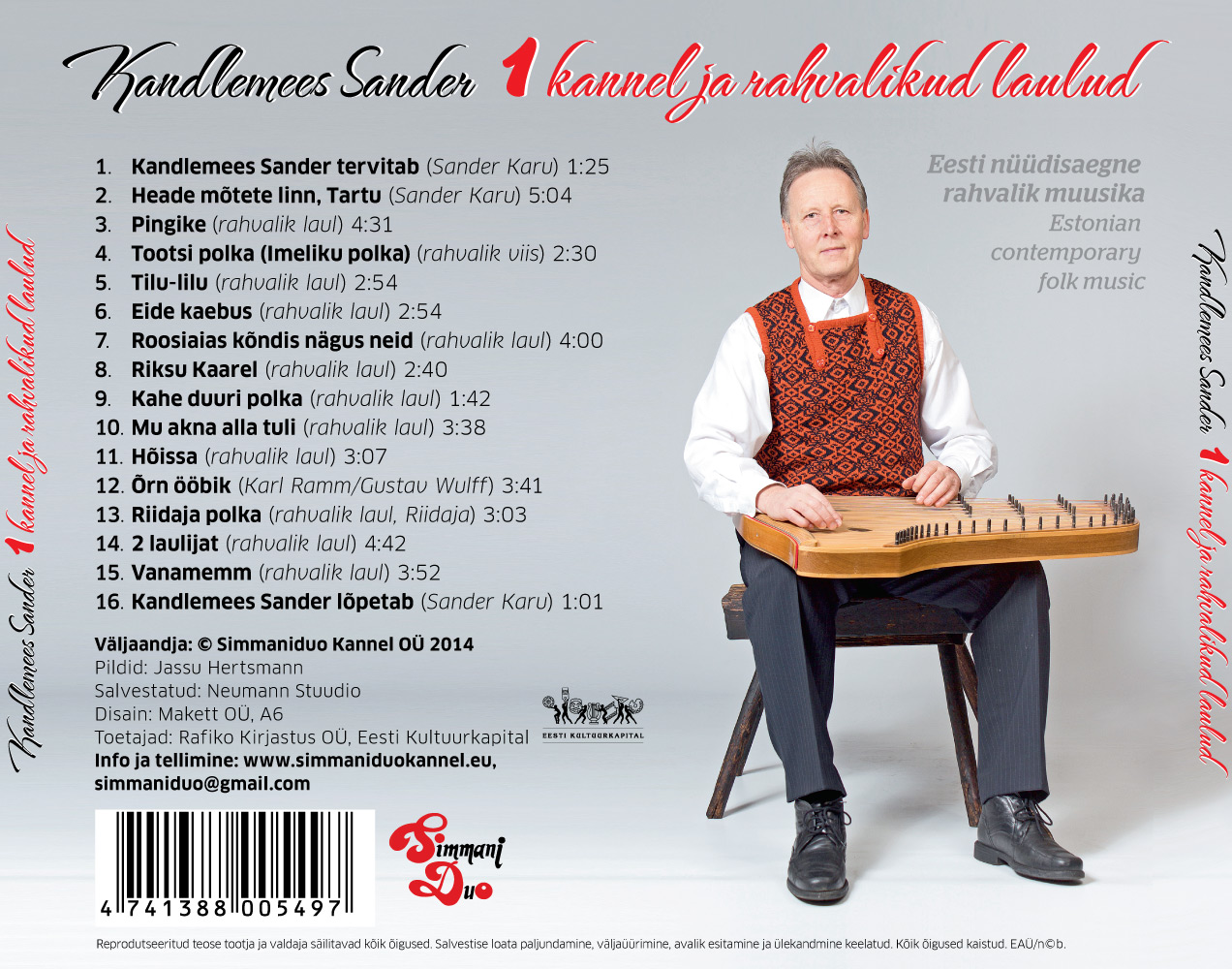 1 kannel ja rahvalikud laulud Kandlemees Sander CD tagakülg